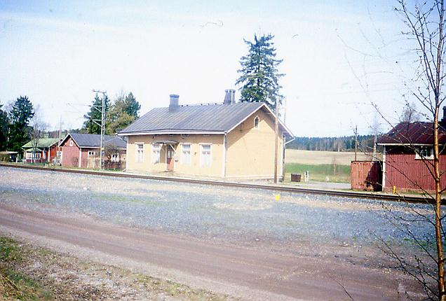 Nikkilän asemarakennus